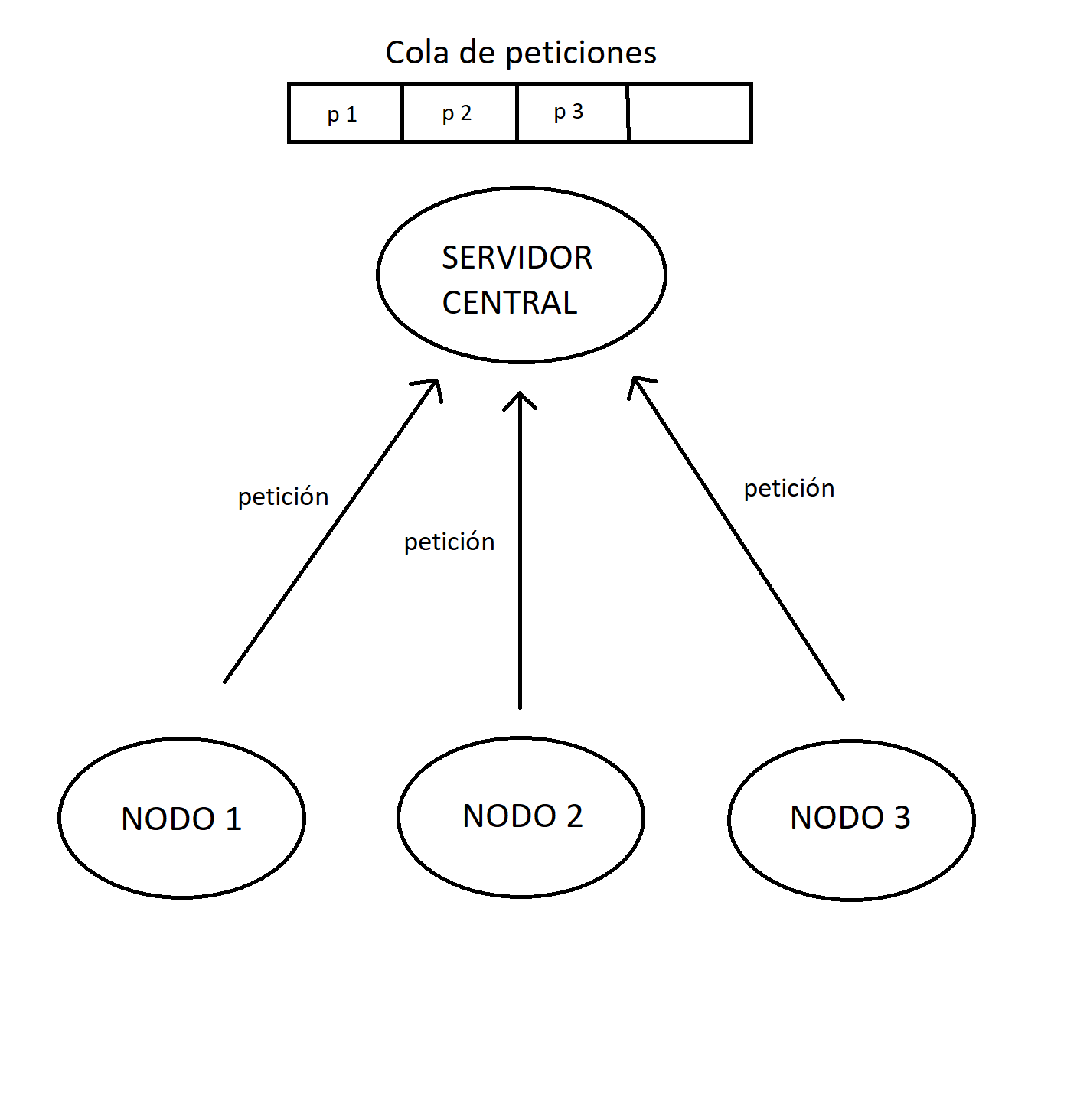 Imagen que describe el algoritmo centralizado para la exclusión mutua en sistemas distribuidos